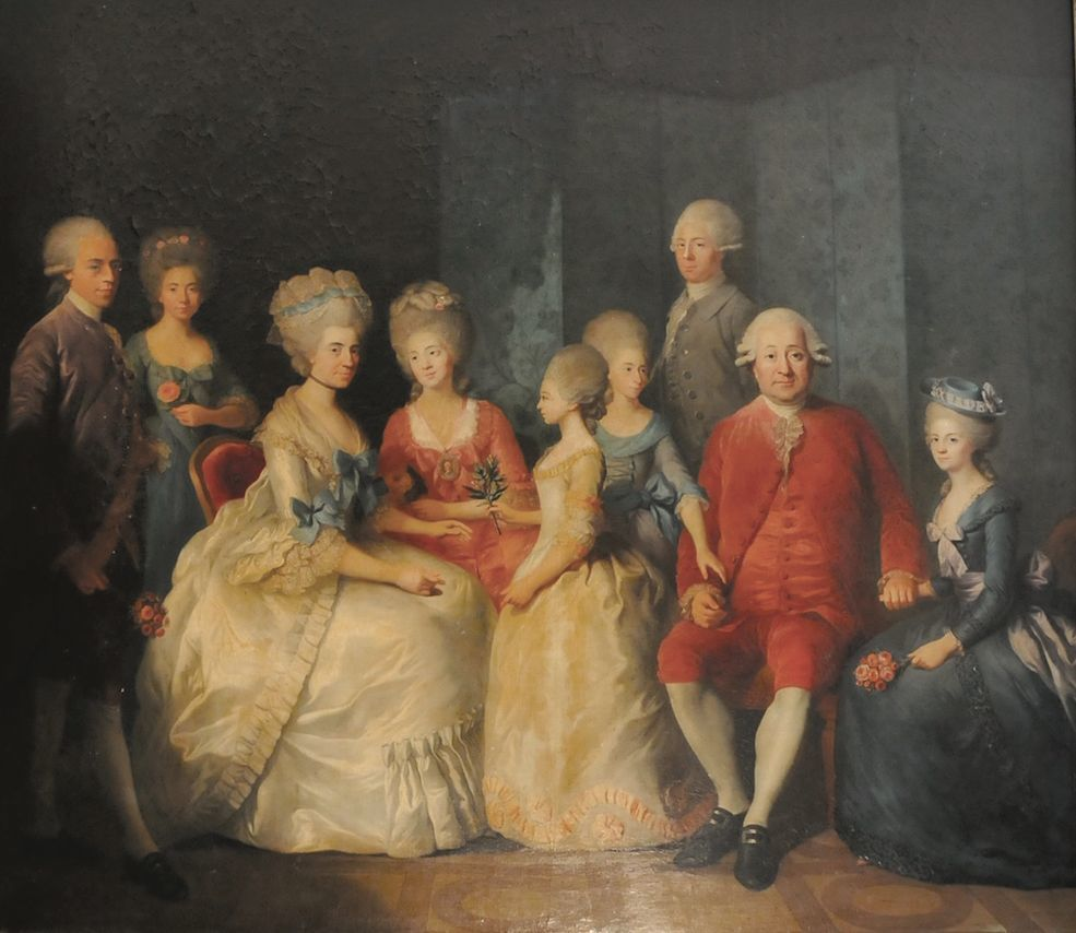 Famille Bonnaffé (François Bonnaffé, assis en rouge). Noms des personnes représentées, de gauche à droite : François-Étienne, fils aîné ; Elisabeth (Betsy) ; Anne Boyer, épouse de François ; Anne (Nancy) ; Jeanne (Jenny) ; Adélaïde (Ketty) ; Jean de Lance ; François Bonnaffé ; Françoise-Pauline.